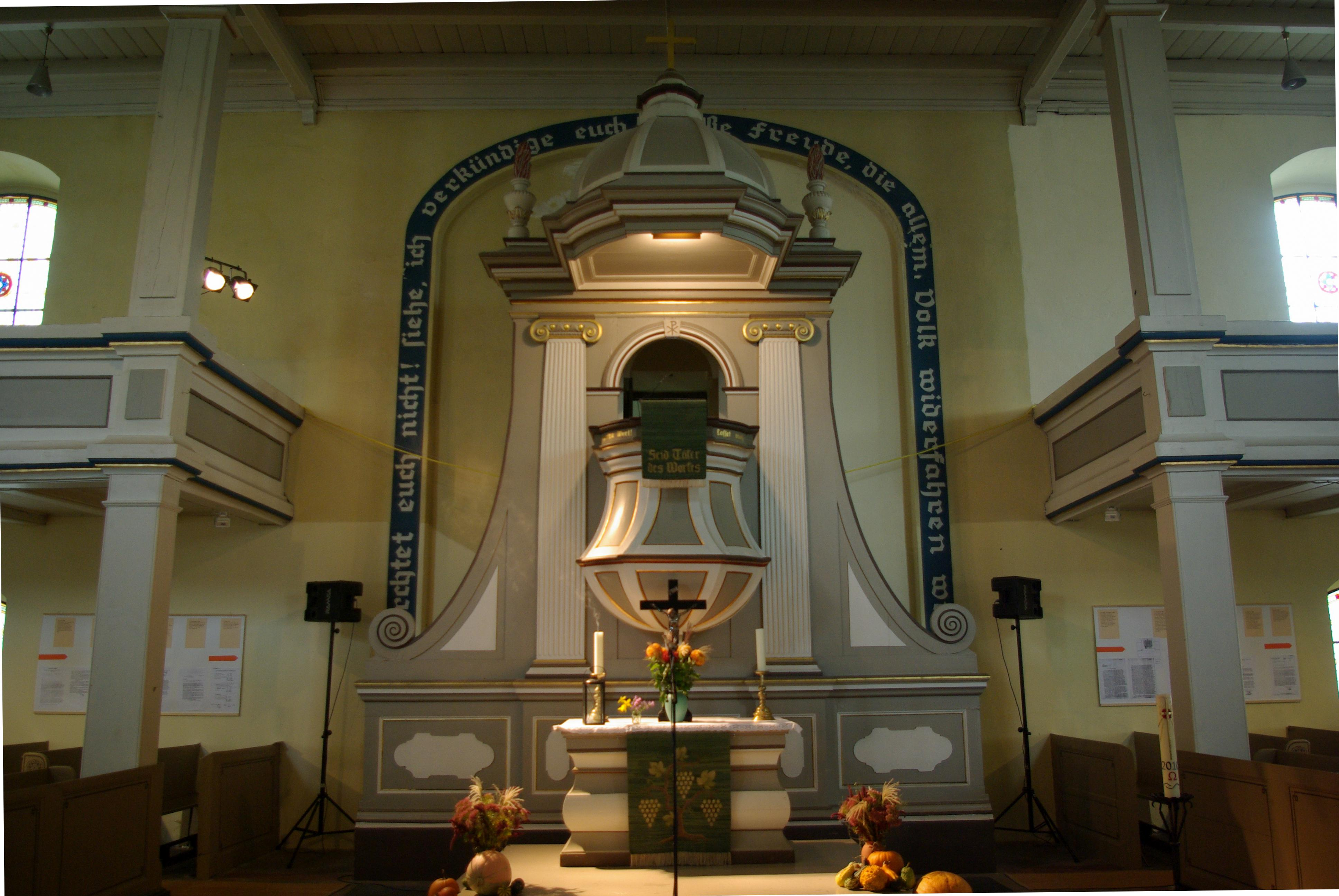 Zossen in Brandenburg. Die Kirche am Marktplatz steht unter Denkmalschutz. Die Kirche wurde 1649 errichtet.